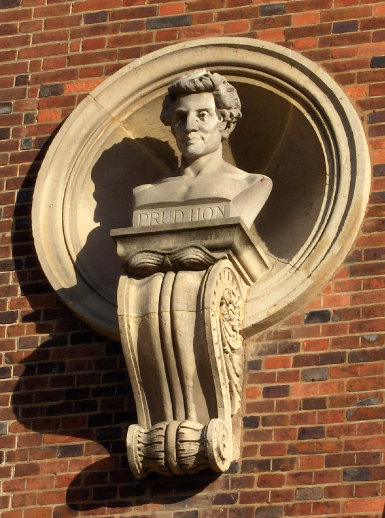 Gustave Debrie, Buste du peintre Pierre-Paul Prud'hon, Paris, palais du Luxembourg.